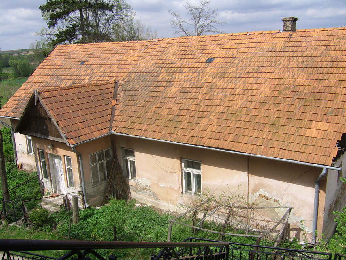 Dobranowice (powiat krakowski) - Stara plebania przy Kościele pw. Św. Krzyża.